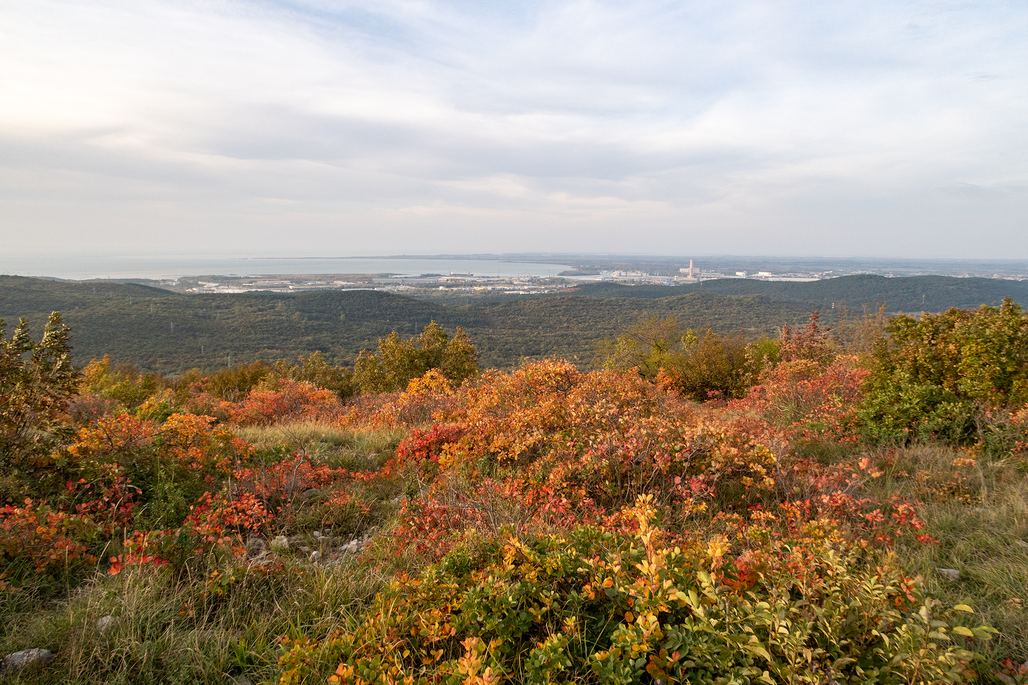 Pogled iz Kremenjaka proti Tržaškemu zalivu